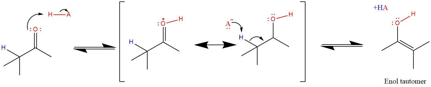 Illustrasjon over keto-enol tautometisering under sure forhold.